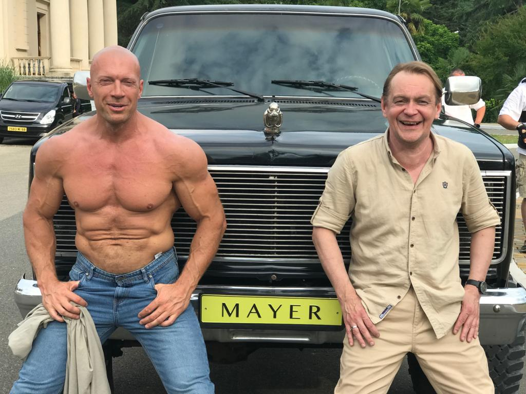 Денис Семенихин и Михаил Горевой во время съемок фильма